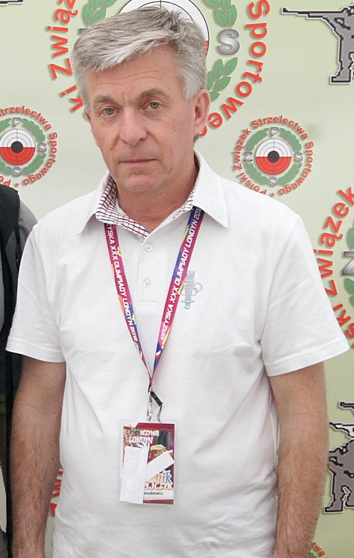 Jerzy Grzeszkiewicz, polish Shooter.